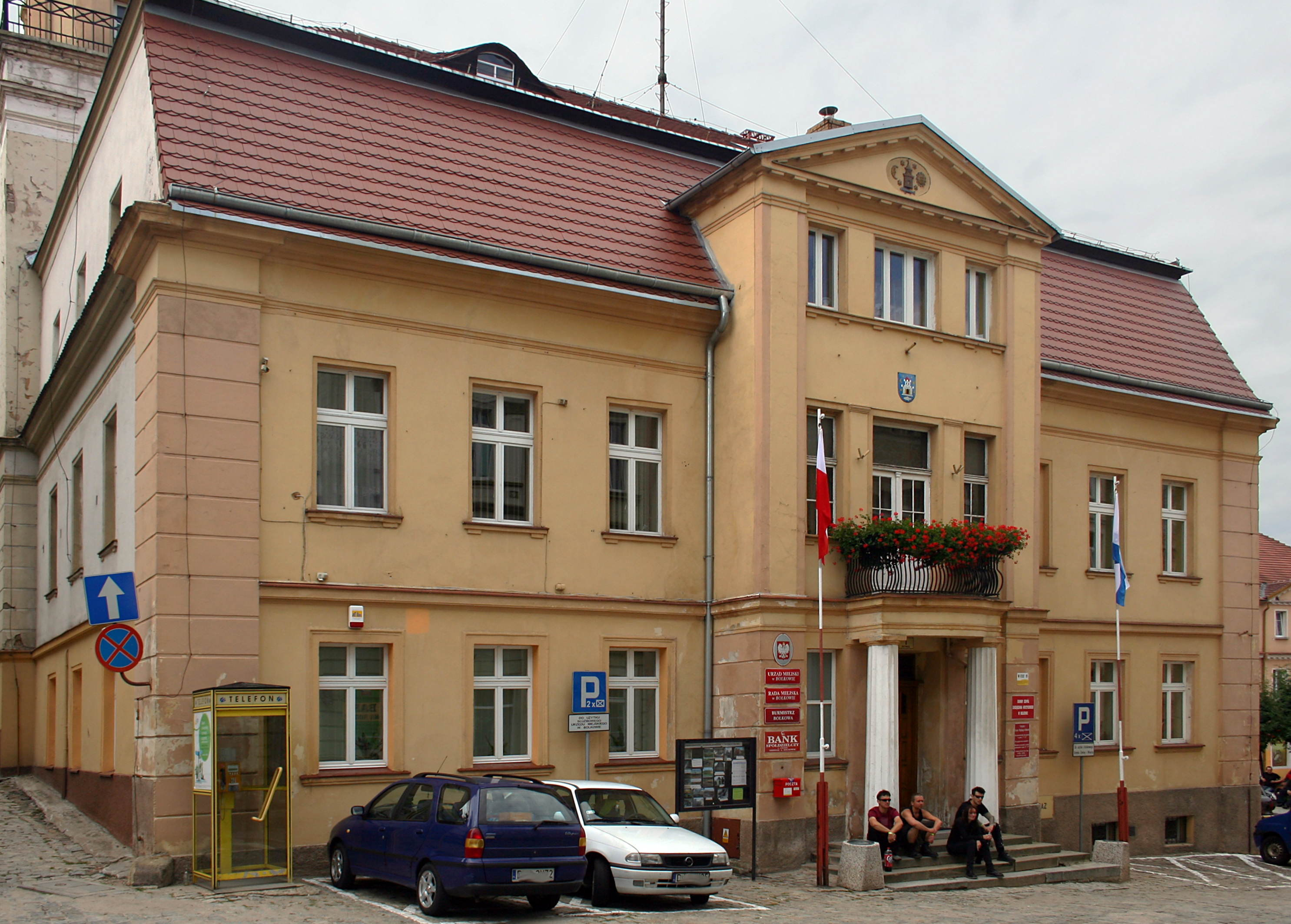 Bolków - ratusz, XVIII